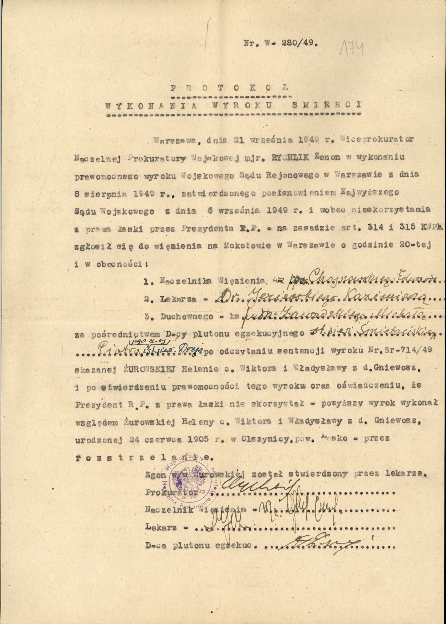 Zdjęcie dokumentu - protokołu wykonania wyroku śmierci na Helenie/Halinie Żurowskiej